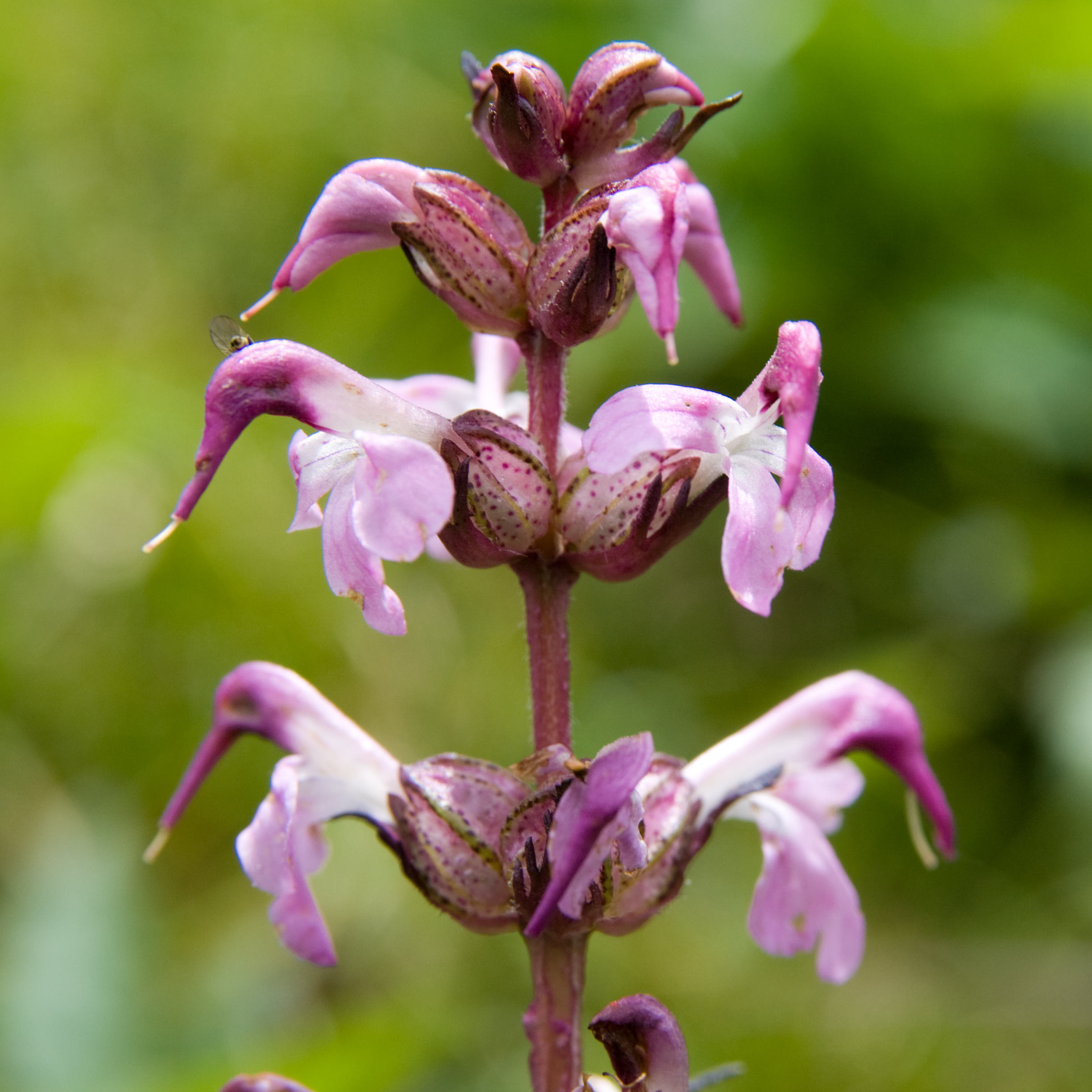 ヨツバシオガマ (学名：Pedicularis chamissonis var. japonica)